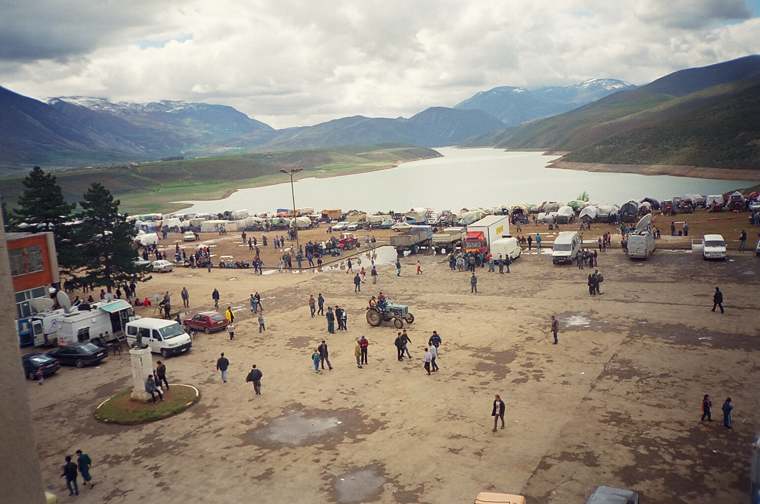 Sheshi Skenderbej Bashkia Kukes gjate Eksodit te kosovareve 1999